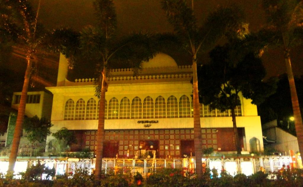 city masjid Hong Kong